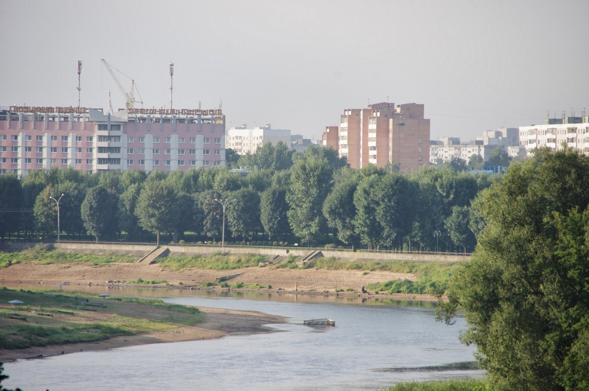 Lieninski District, Mogilev, Belarus